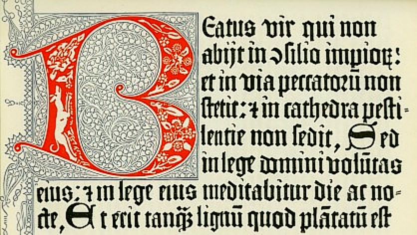 "Psalterium sive psalmorum"